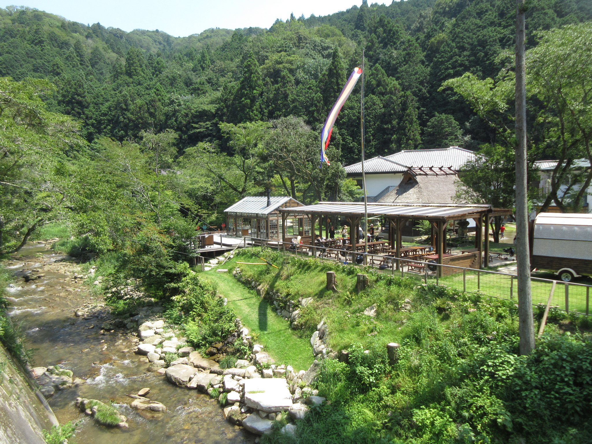 ウッドデザインパーク（岡崎市鍛埜町）